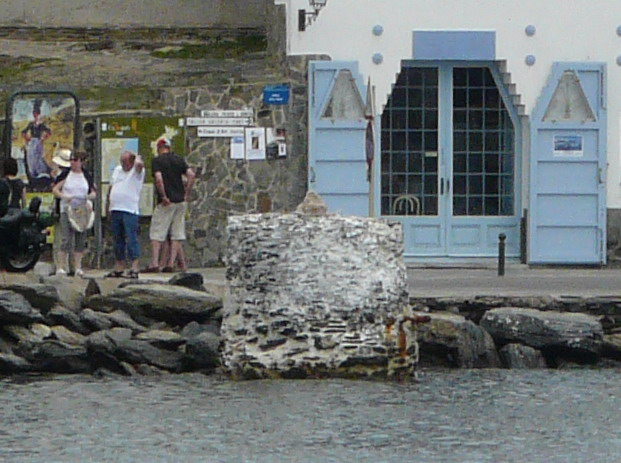 Norai des Podritxo (Cadaqués)